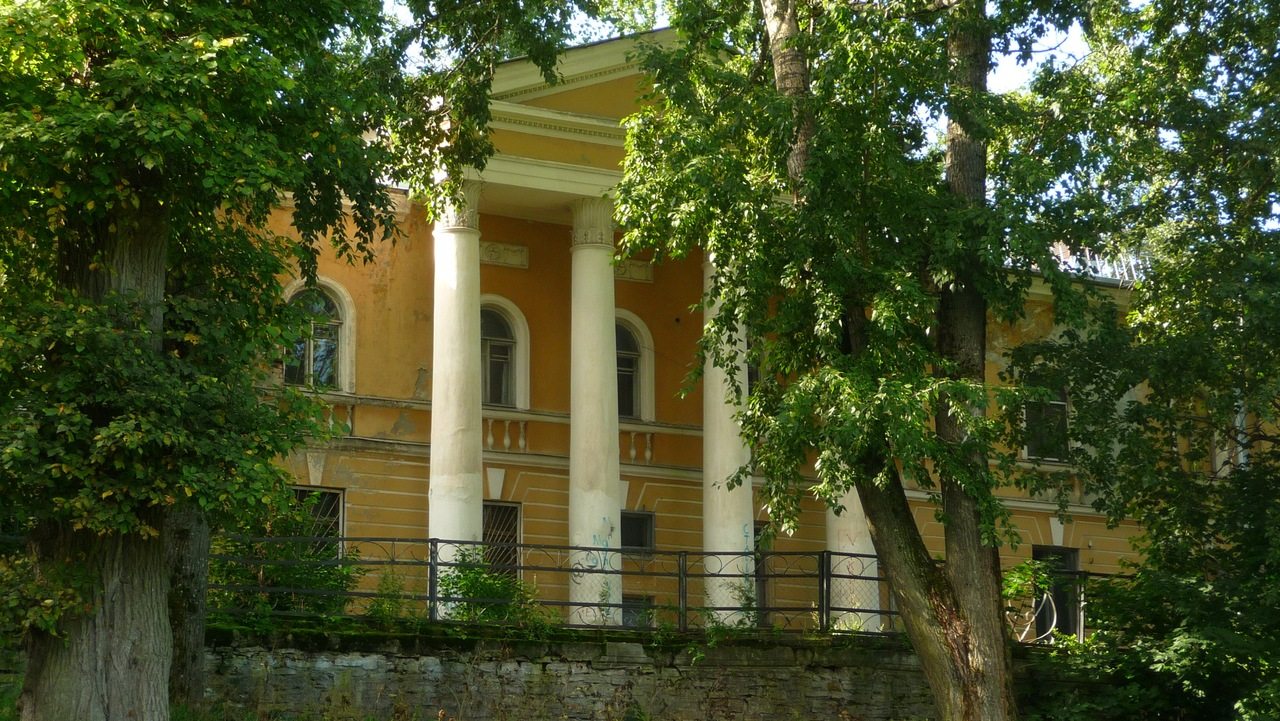 Усадьба Миниха.